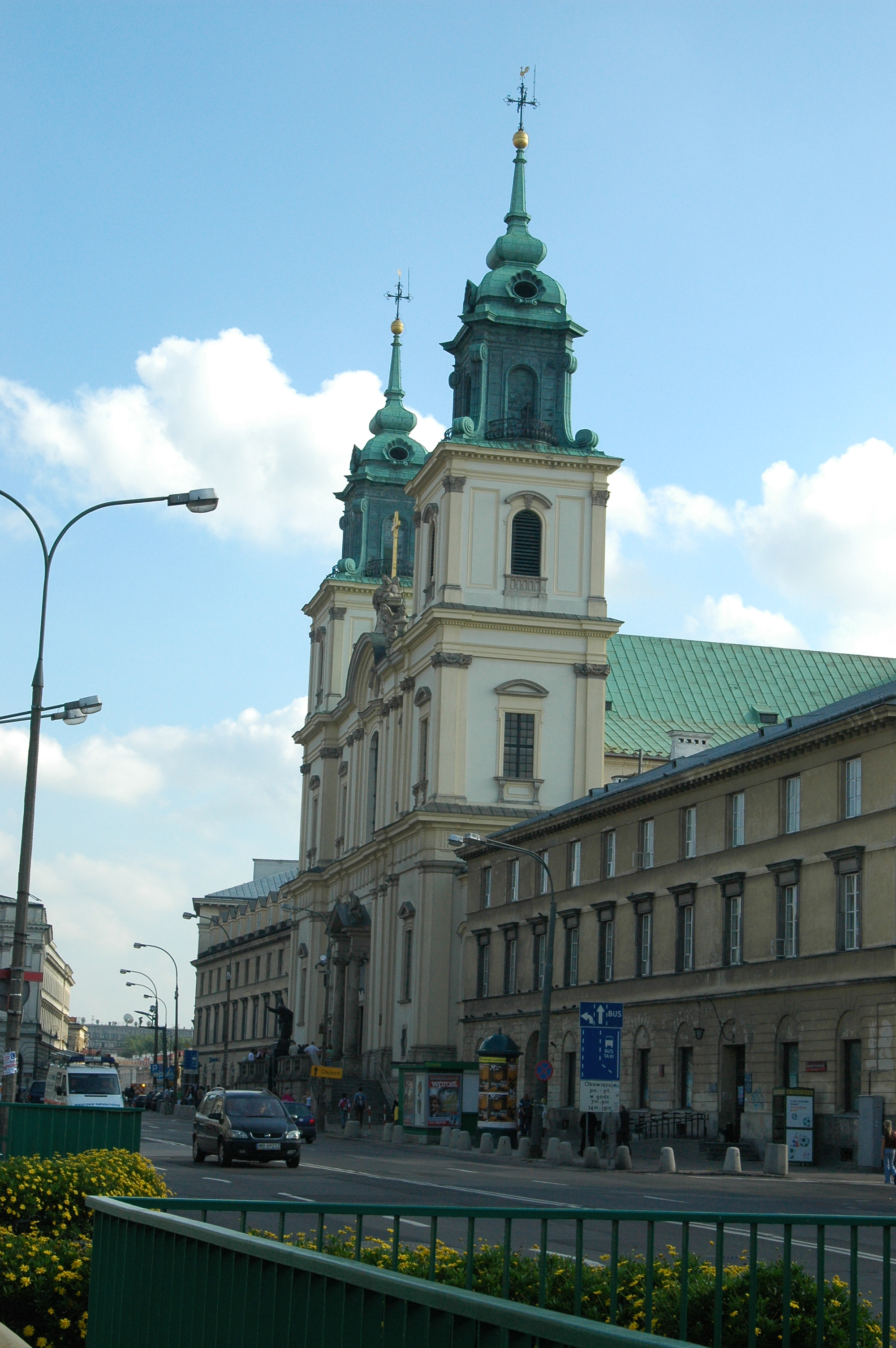 Warsaw's church of the Holy Cross at Krakowskie Przedmieście Street